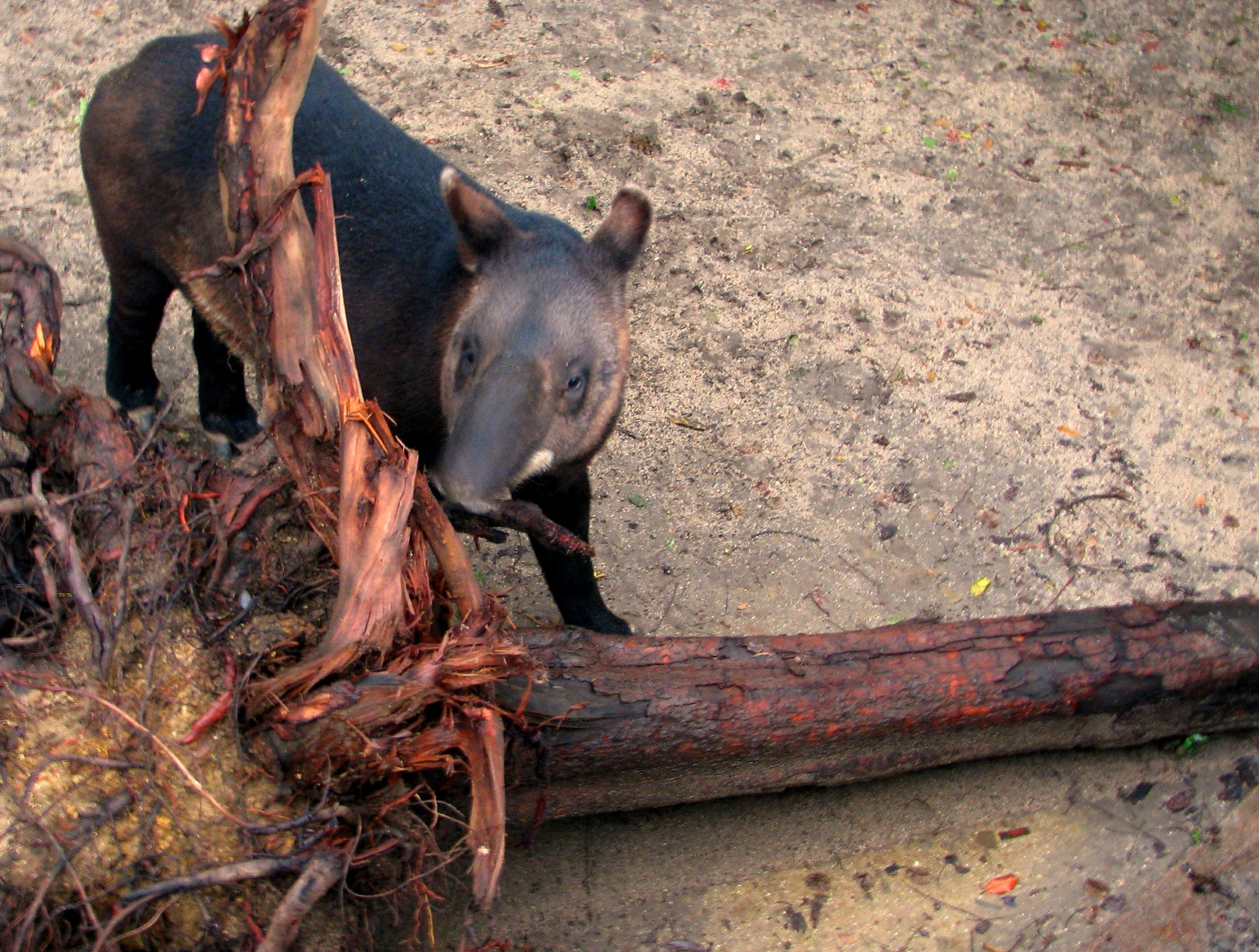 Mountain Tapir